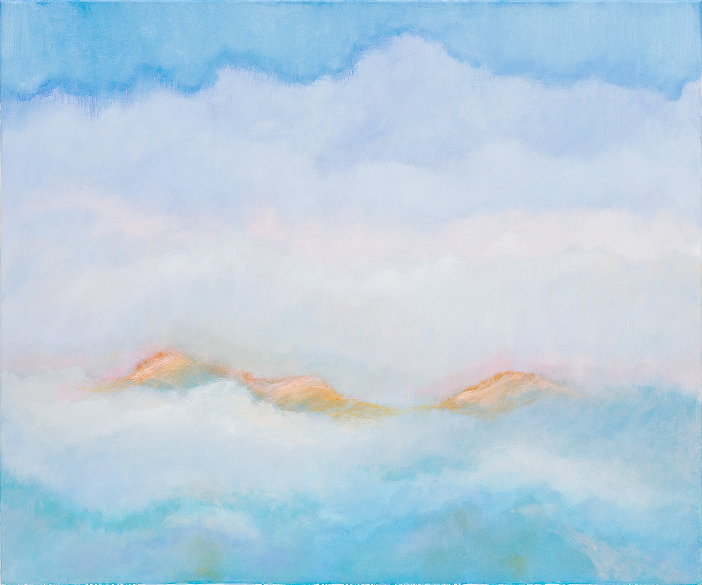 Kontra Ágnes: Felülről című festménye